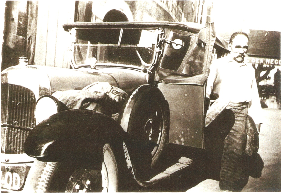 Le boulanger à son départ pour sa tournée hebdomadaire à (71)Donzy le Pertuis.